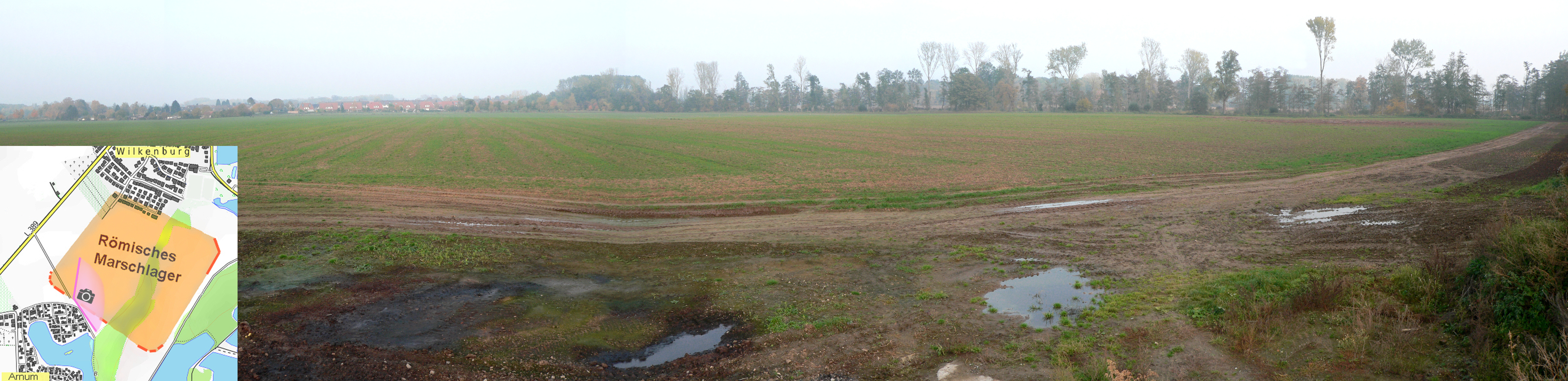 Blick auf eine Ackerfläche im Westbereich des römischen Marschlagers von Wilkenburg mit Lageskizze des Lagers und Einzeichnung des Aufnahmestandorts mit Blickwinkel, im Hintergrund Wilkenburg